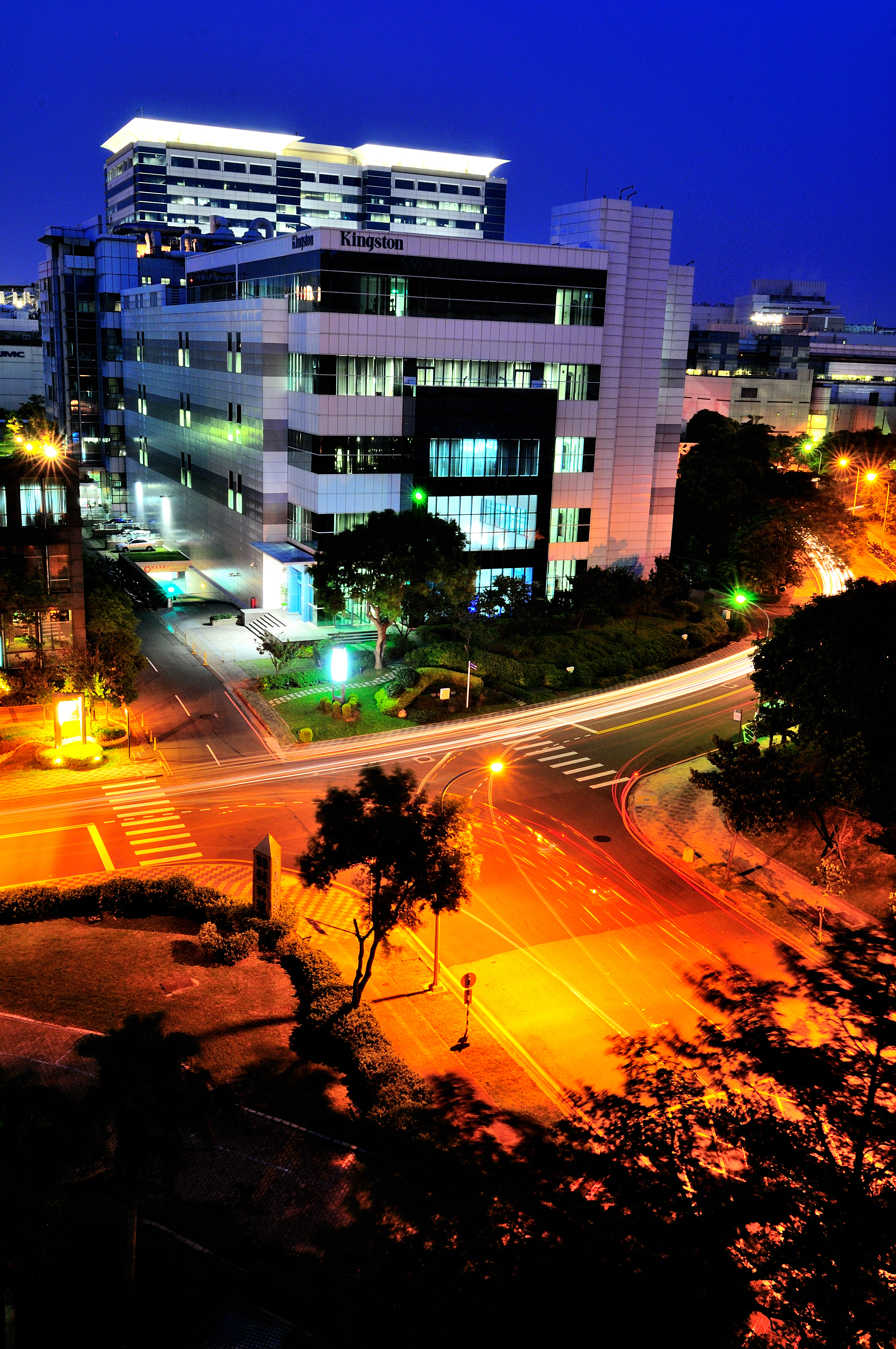 遠東金士頓科技總部，位於新竹市新竹科學工業園區力行一路1之5號。